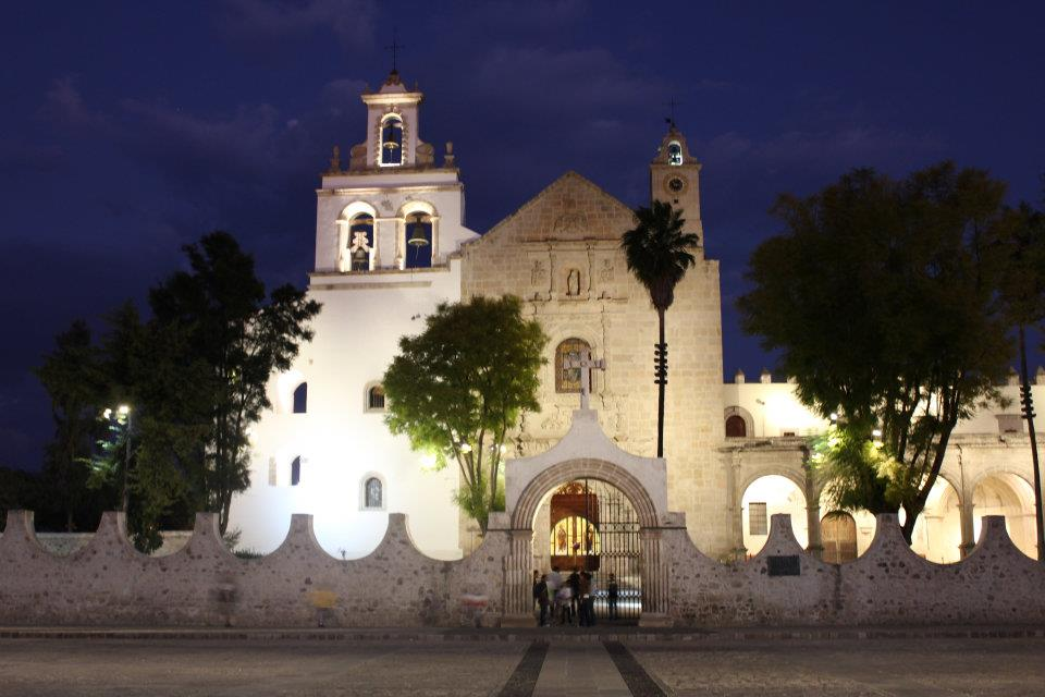 Convento de Sta. María Magdalena